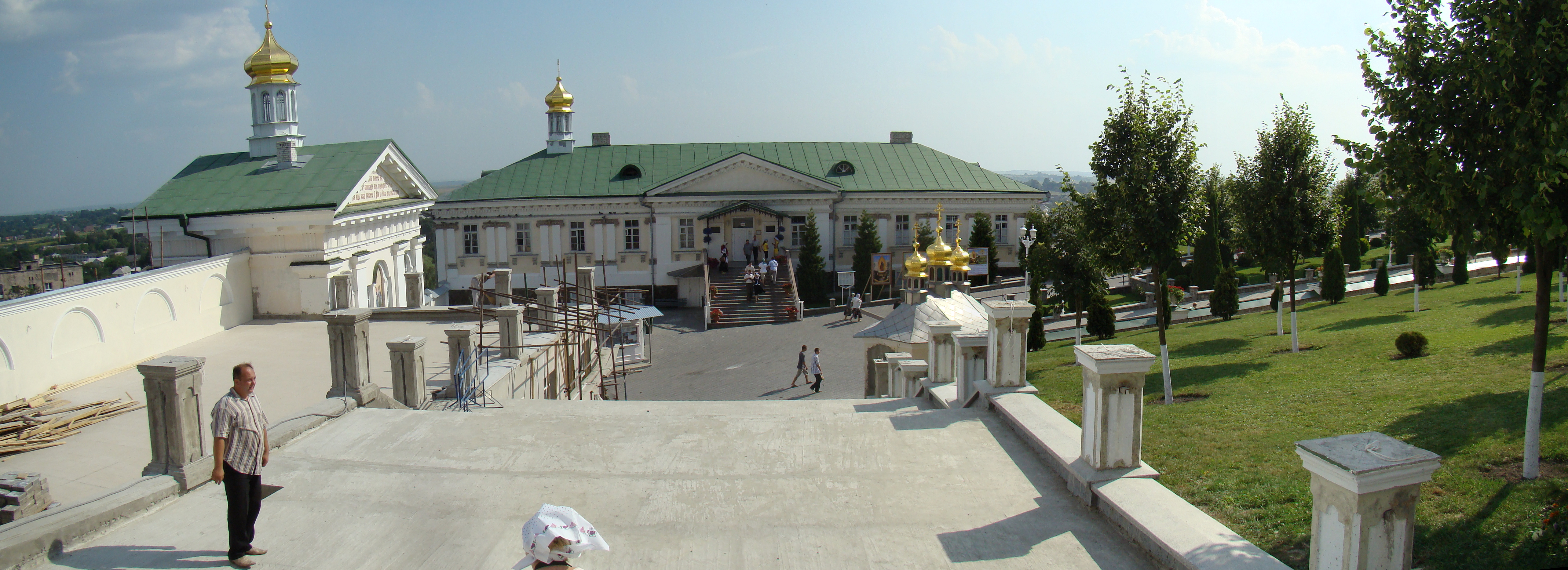 Почаївська лавра :, Почаїв, пл. Возз"єднання